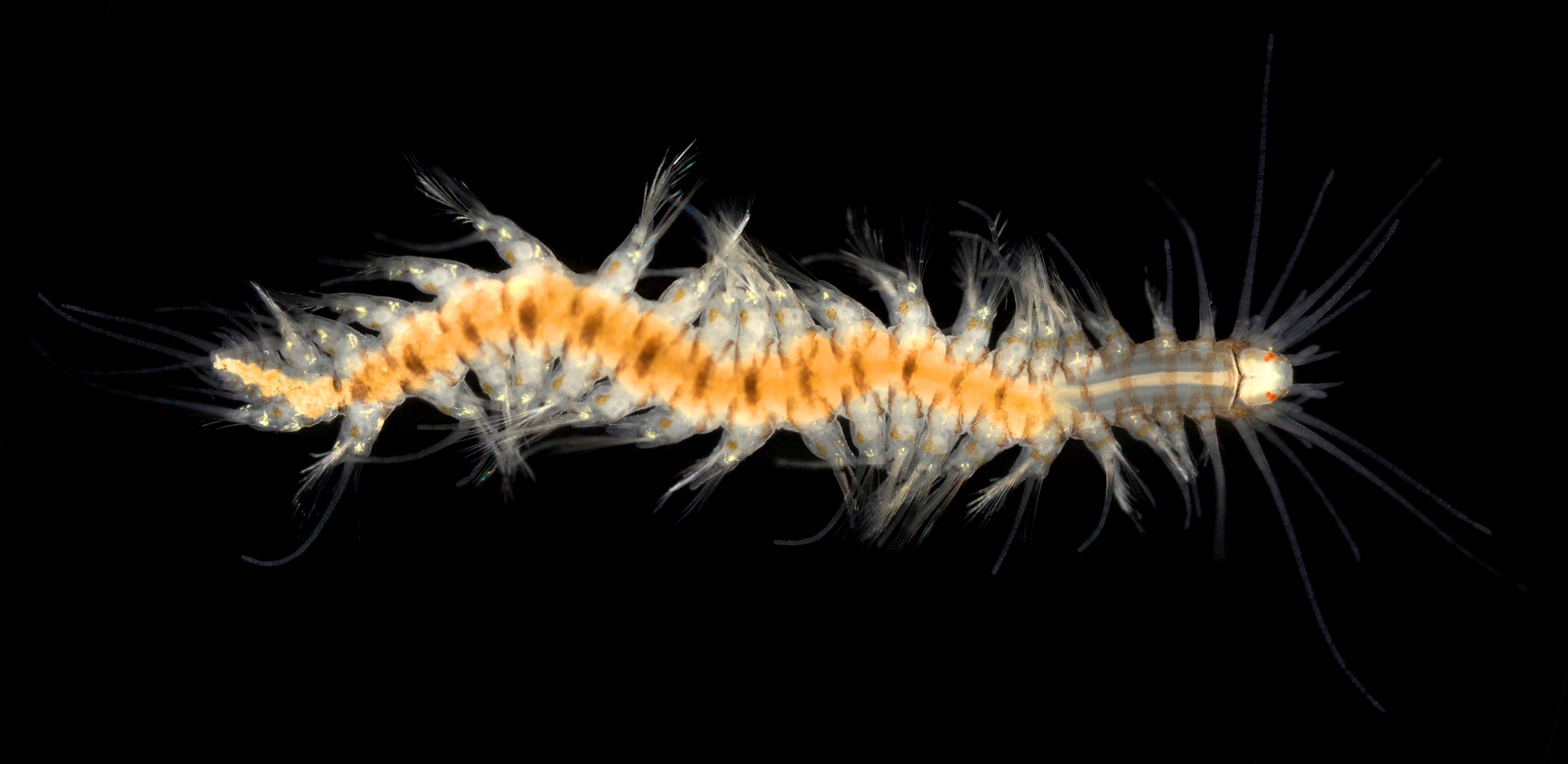 Gyptis propinqua